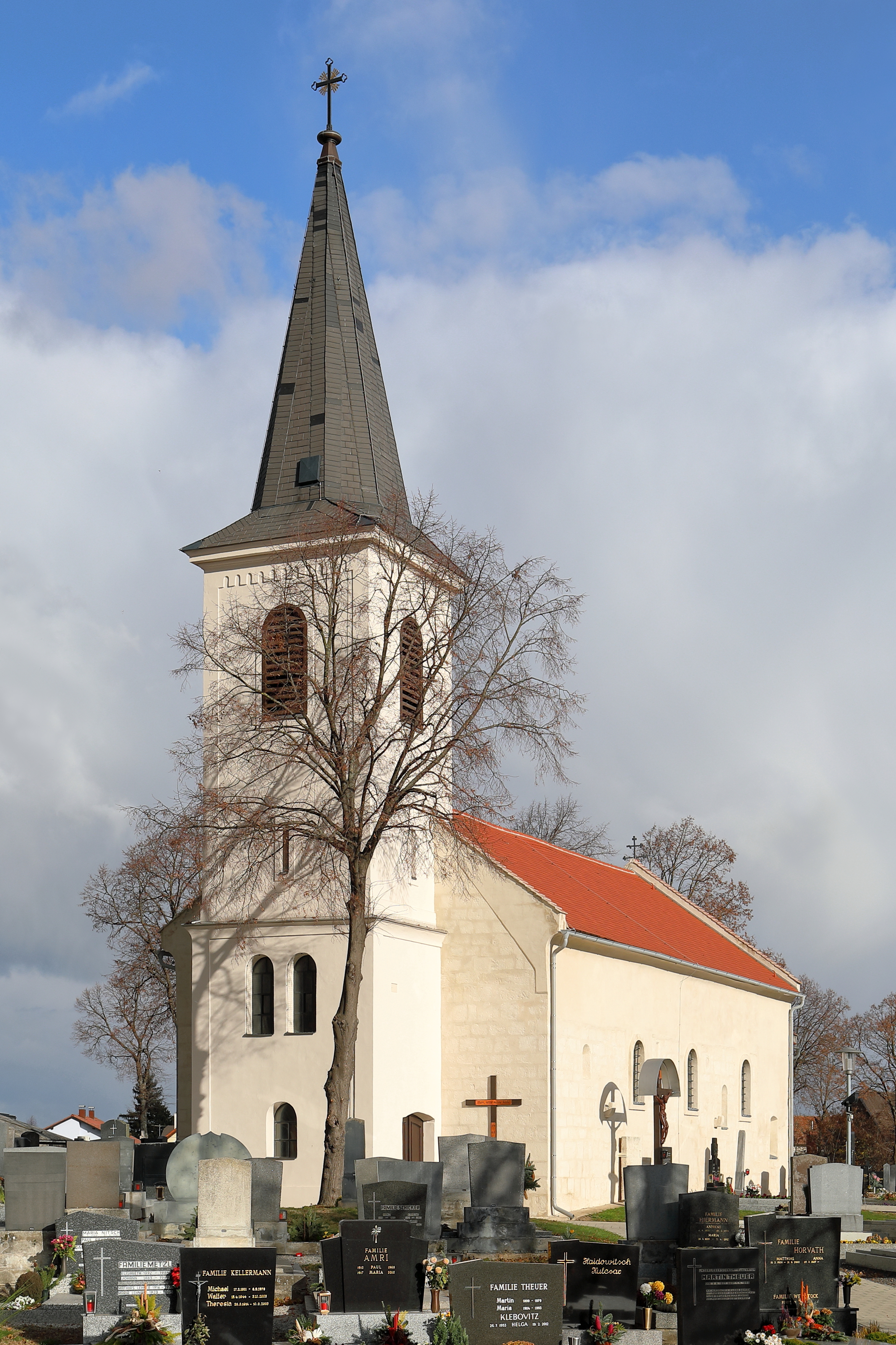 Südwestansicht der röm.-kath. Pfarrkirche Hll. Petrus und Paulus in der burgenländischen Marktgemeinde Zurndorf.Eine im Kern romanische-frühgotische Saalkirche in erhöhter Lage, die von einem Friedhof umgeben ist. Der zweigeschossige, vorgestellte West wurde nach einem Brand 1857 wiederinstandgesetzt bzw. neu errichtet.